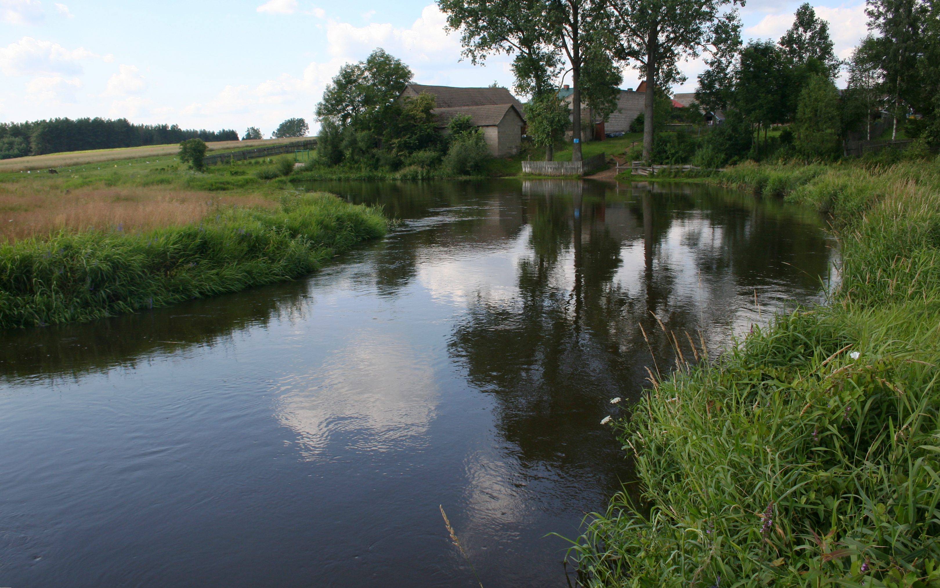 Narew przepływająca przy wsi Bieńdziuga, gmina Michałowo, woj. podlaskie